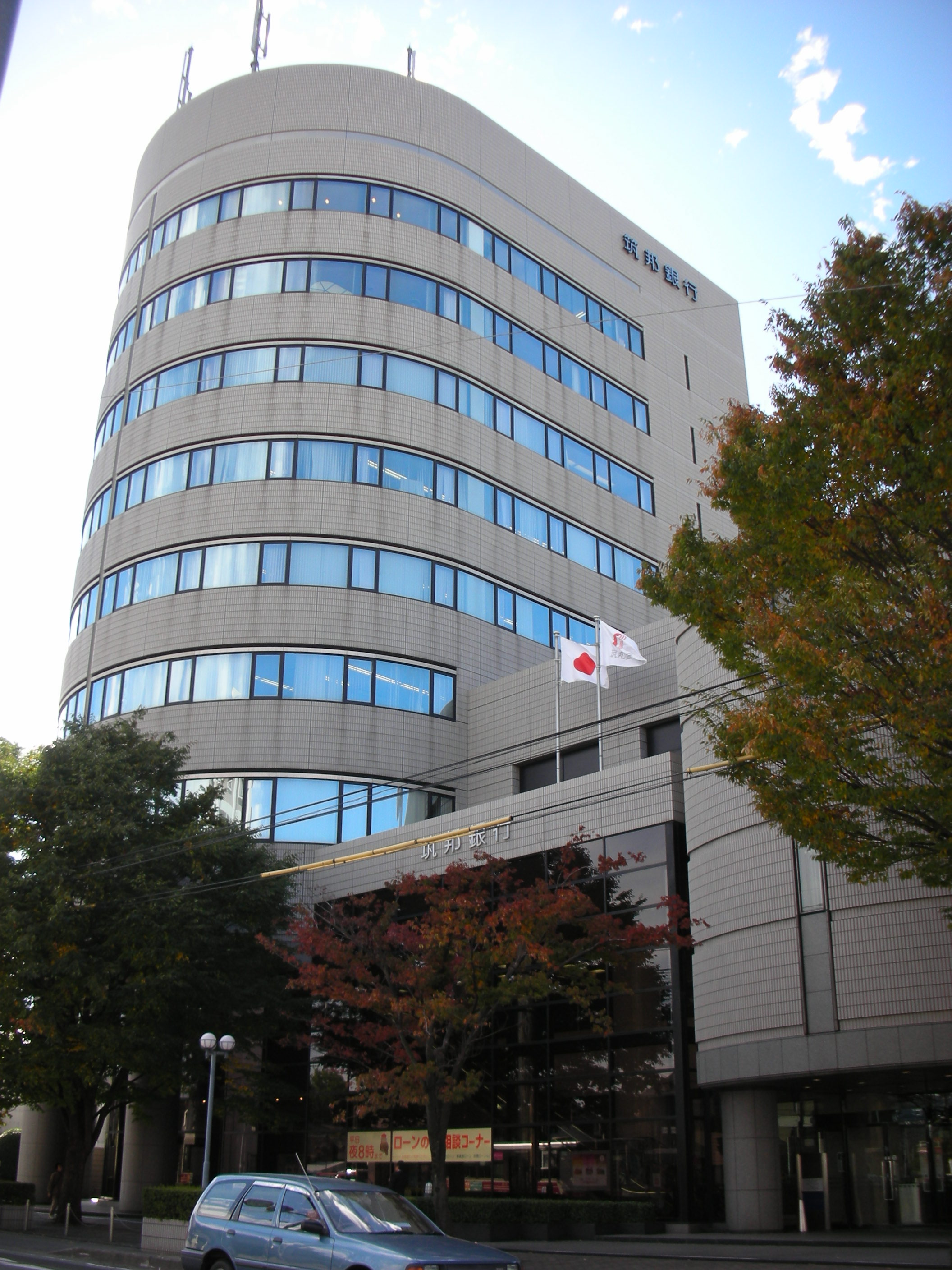 筑邦銀行本店